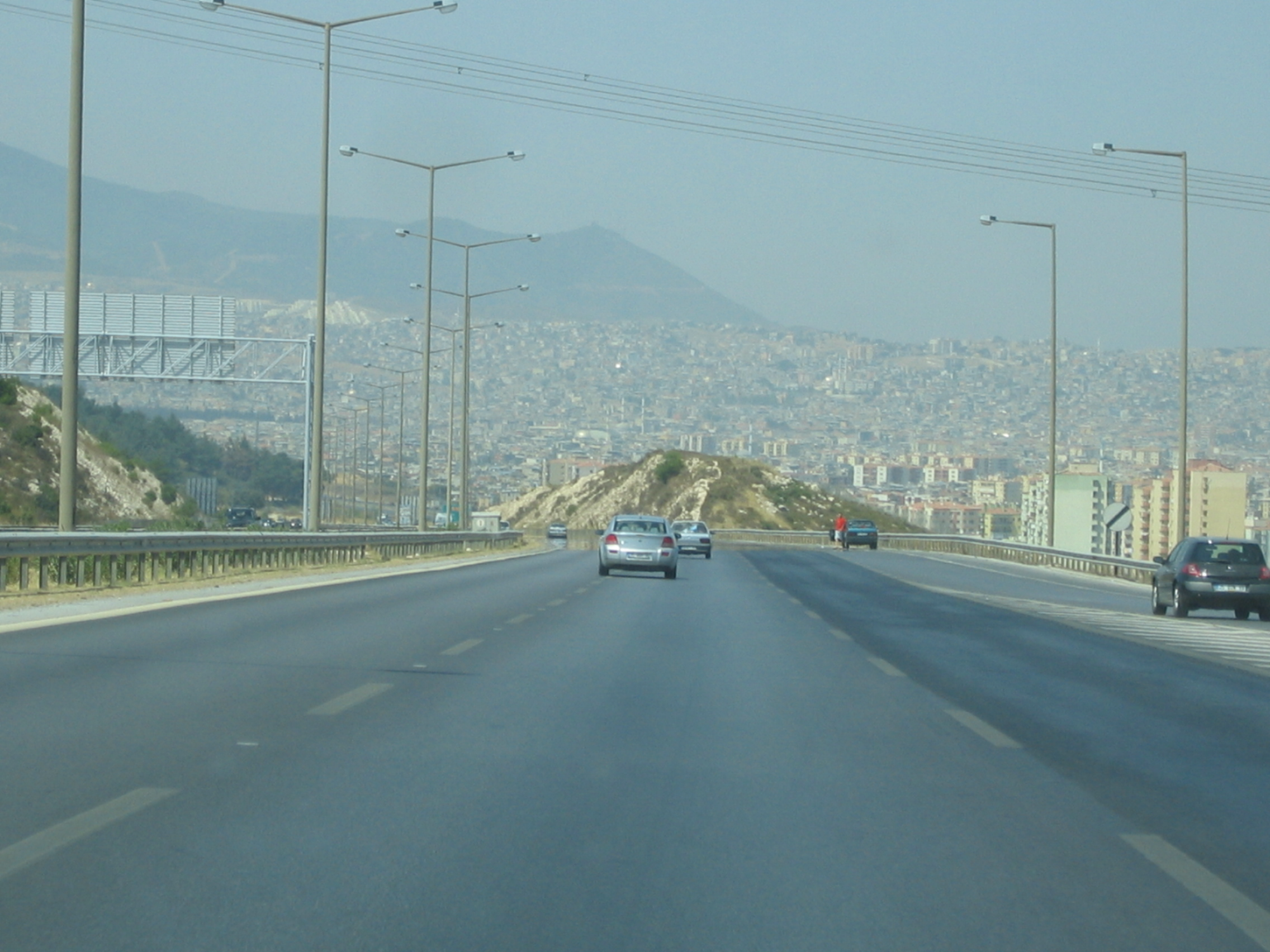 izmir cevre yolu (izmir manzara)